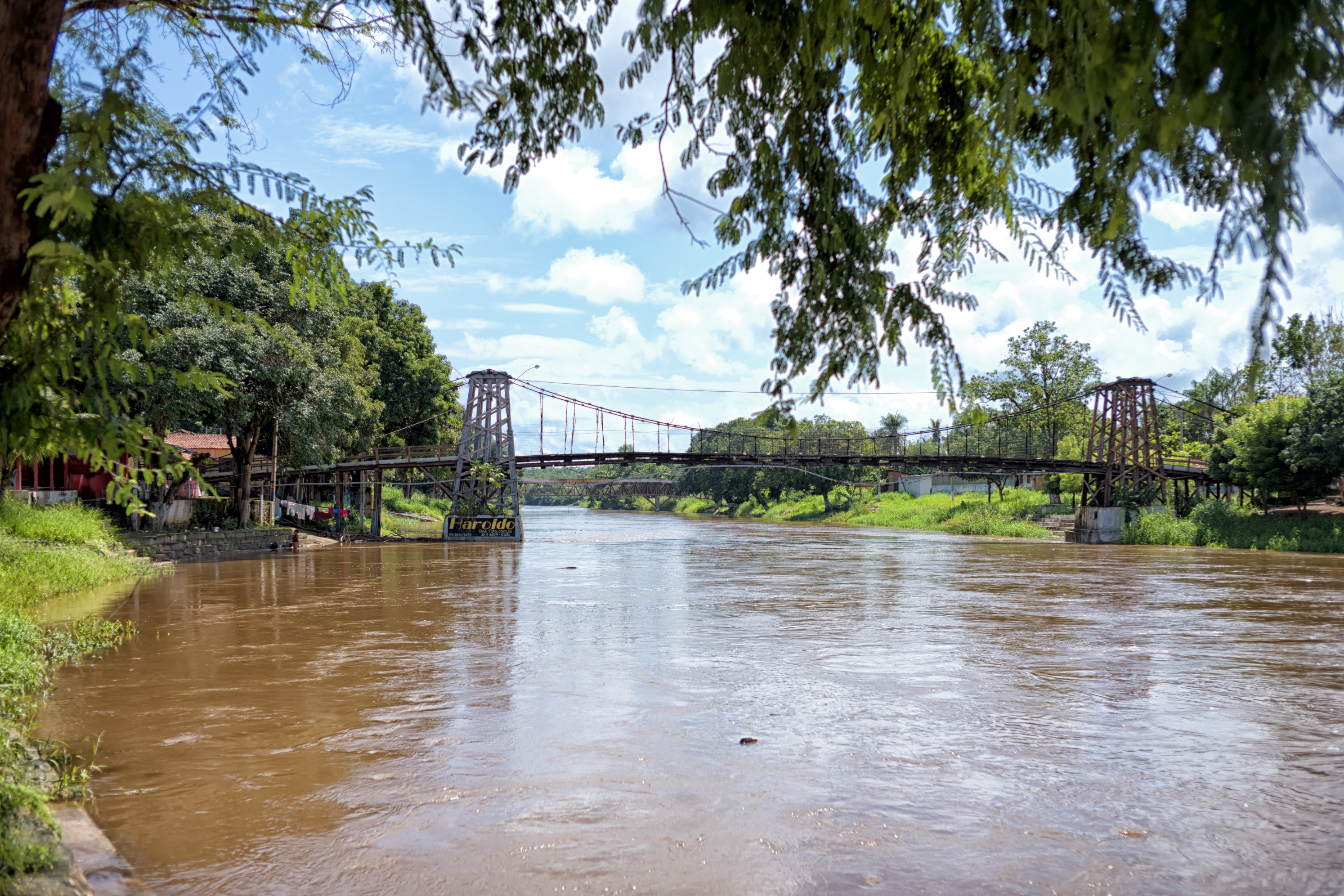 Balsas 2018-4